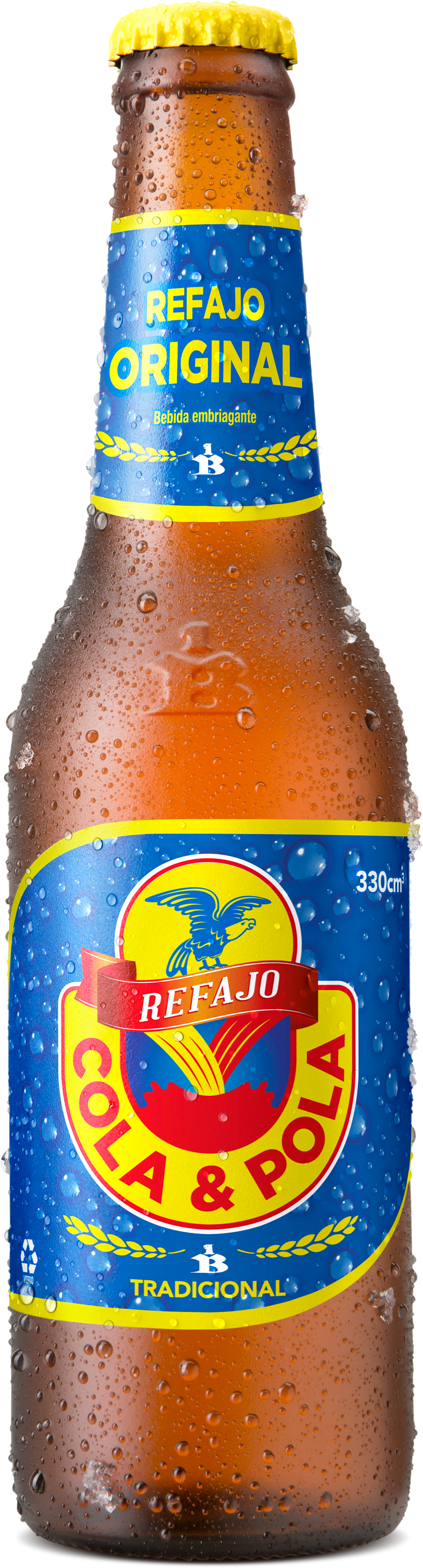 Botella de Cola y Pola - Producto Colombiano - Refajo